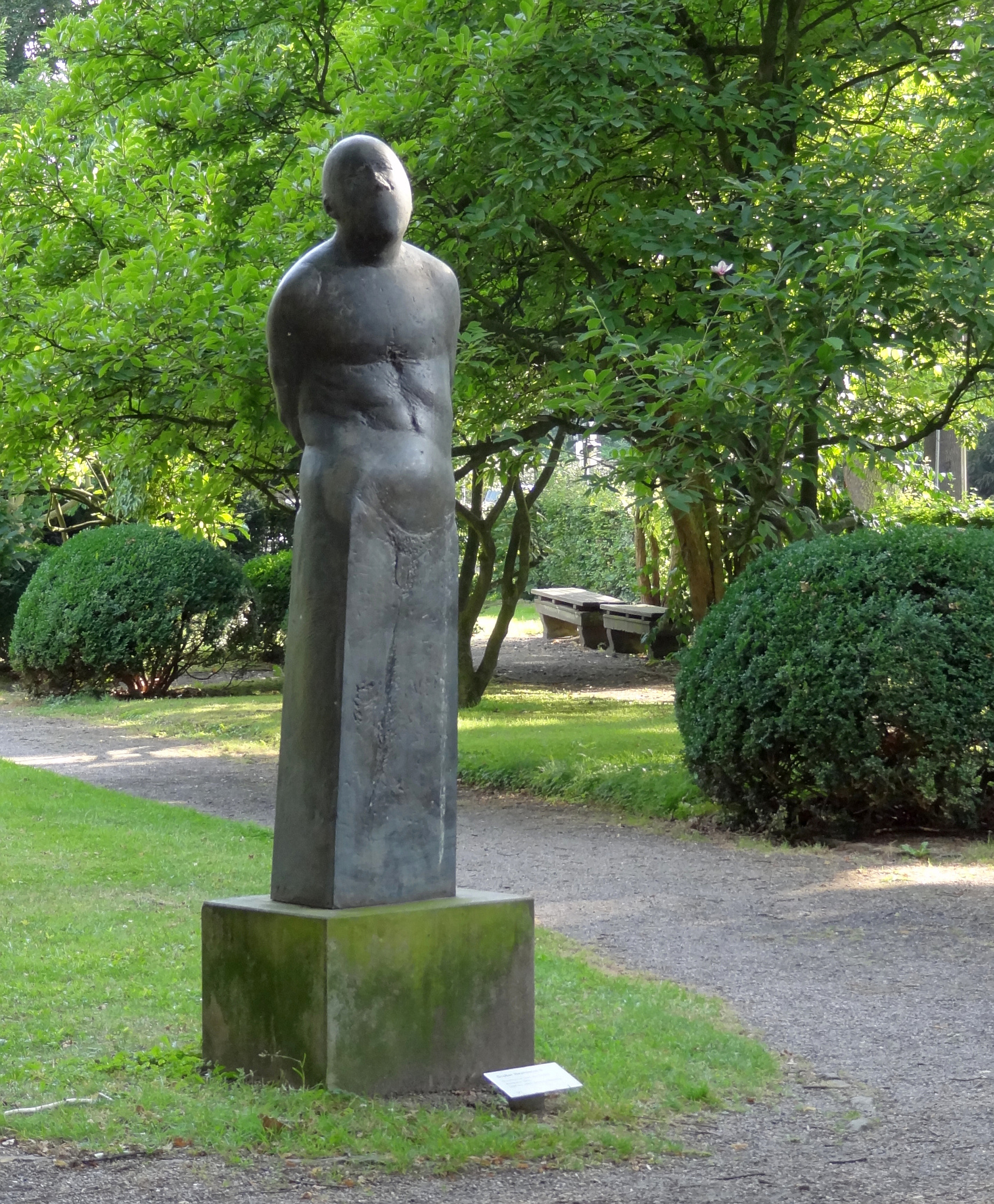 Skulptur "Großer Hephästos II" von Waldemar Otto im Park von Gut Riensberg